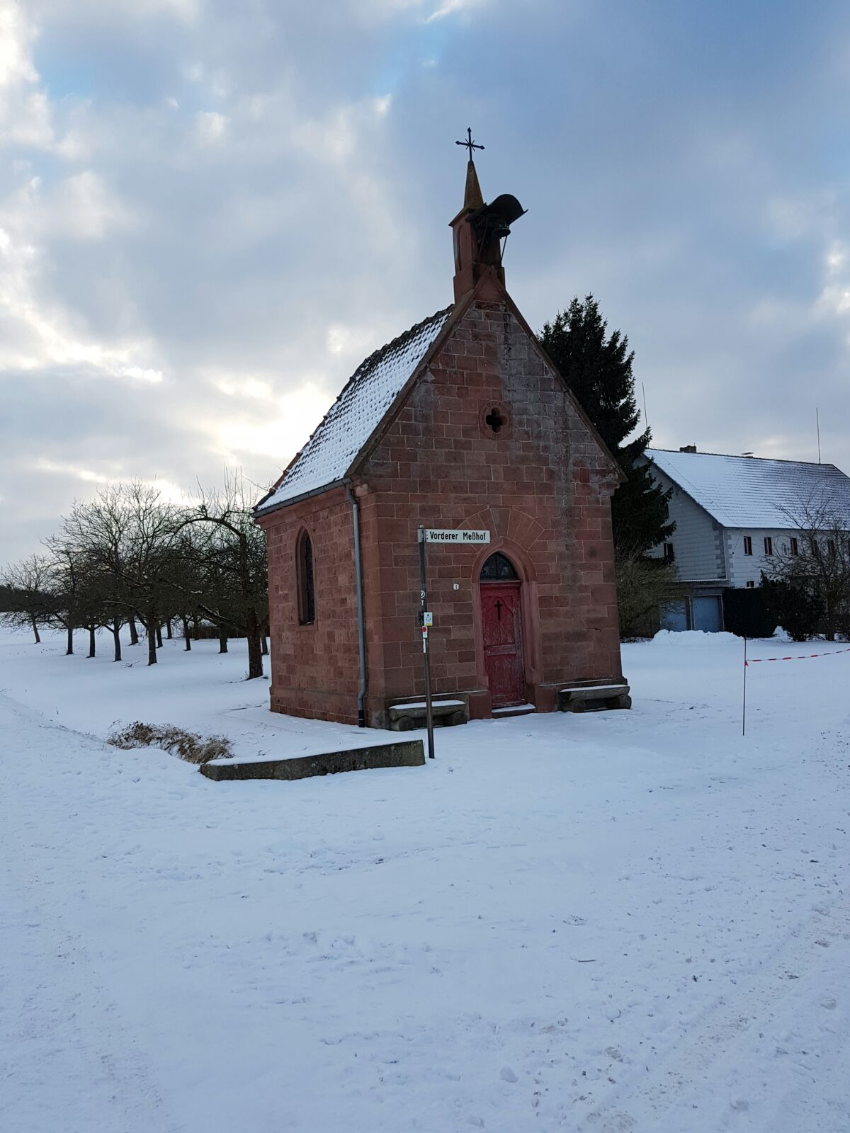 Hofkapelle, Vorderer Meßhof Der Vordere Meßhof ist ein Hof bei Steinbach, Stadt Külsheim, Main-Tauber-Kreis.